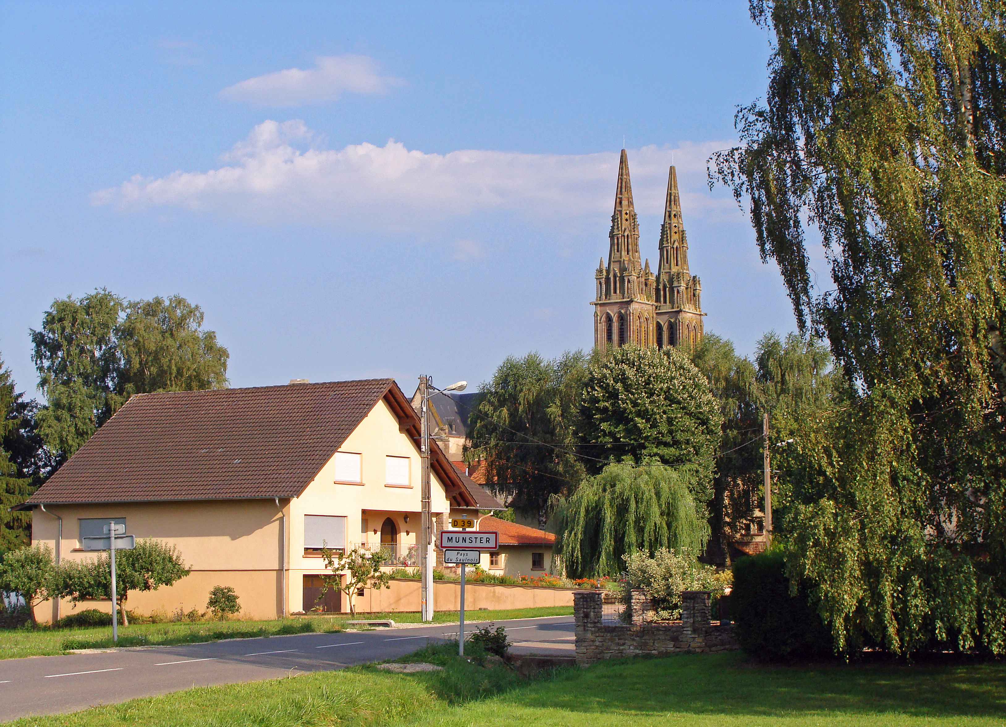 Vue de Munster en Lorraine et de sa collégiale Saint-Nicolas (XIIIe)